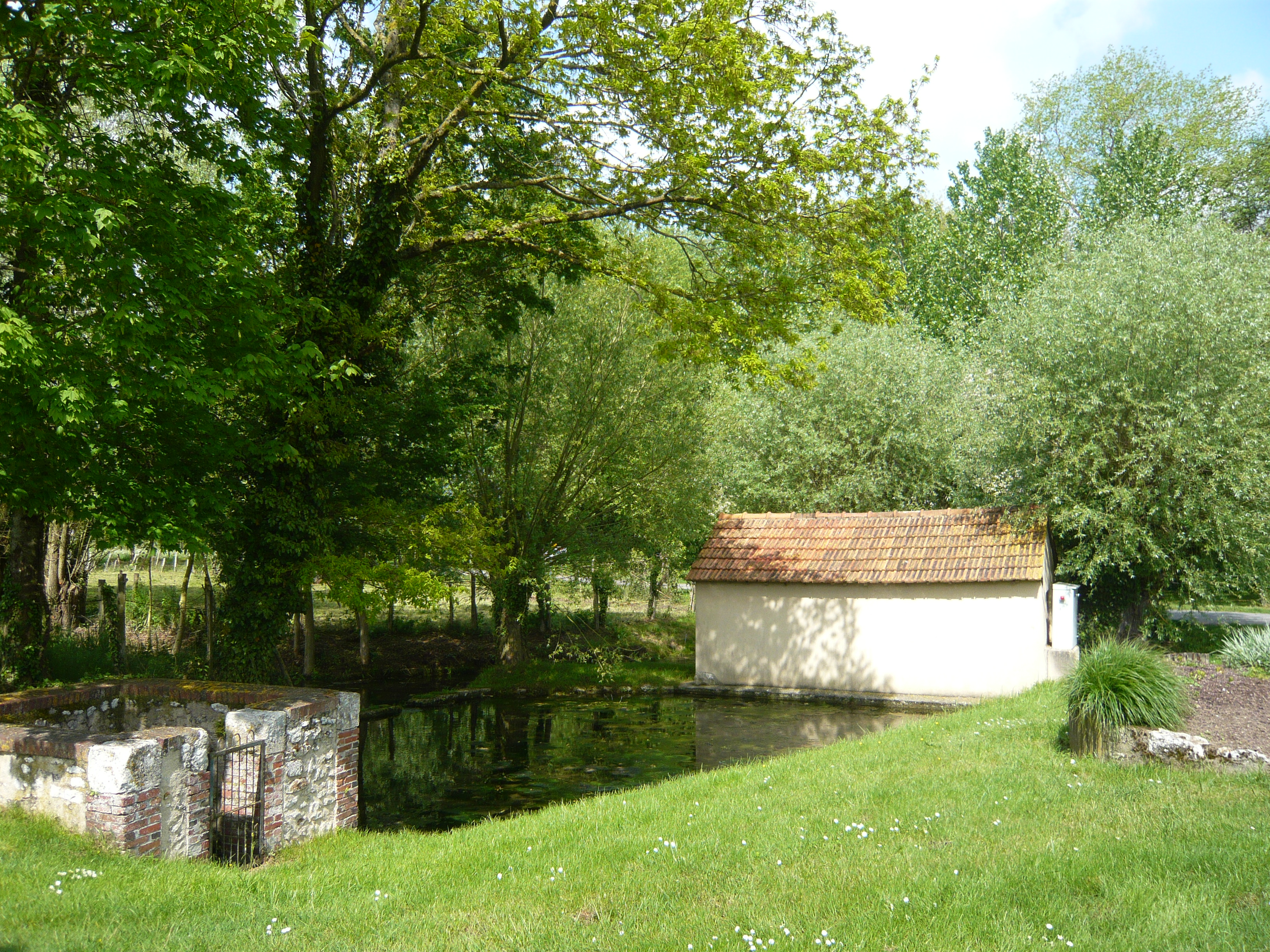 Le lavoir d'Houdouenne, Ver-lès-Chartres, Eure-et-Loir (France).